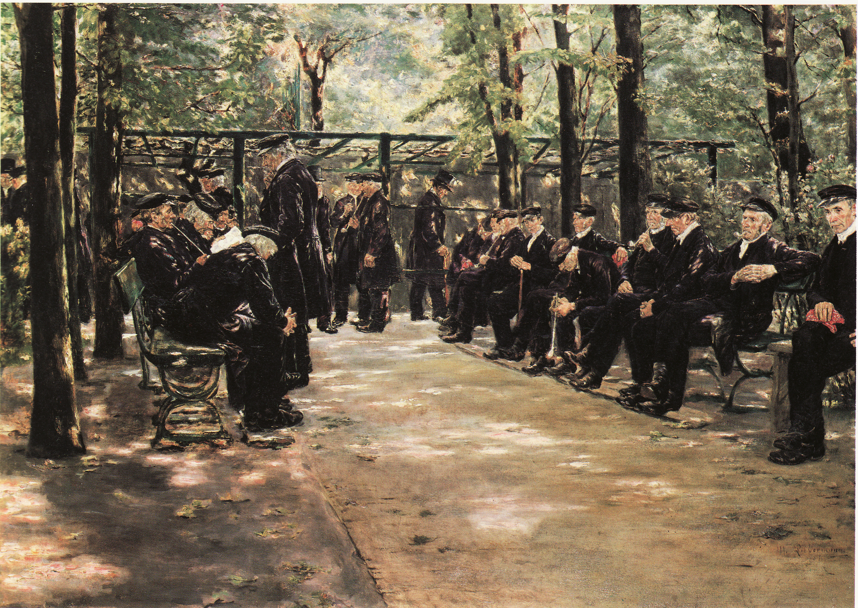 "Altmännerhaus in Amsterdam", Öl auf Holz. 55,3 x 75,2 cm. Sammlung G. Schäfer, Schweinfurth.